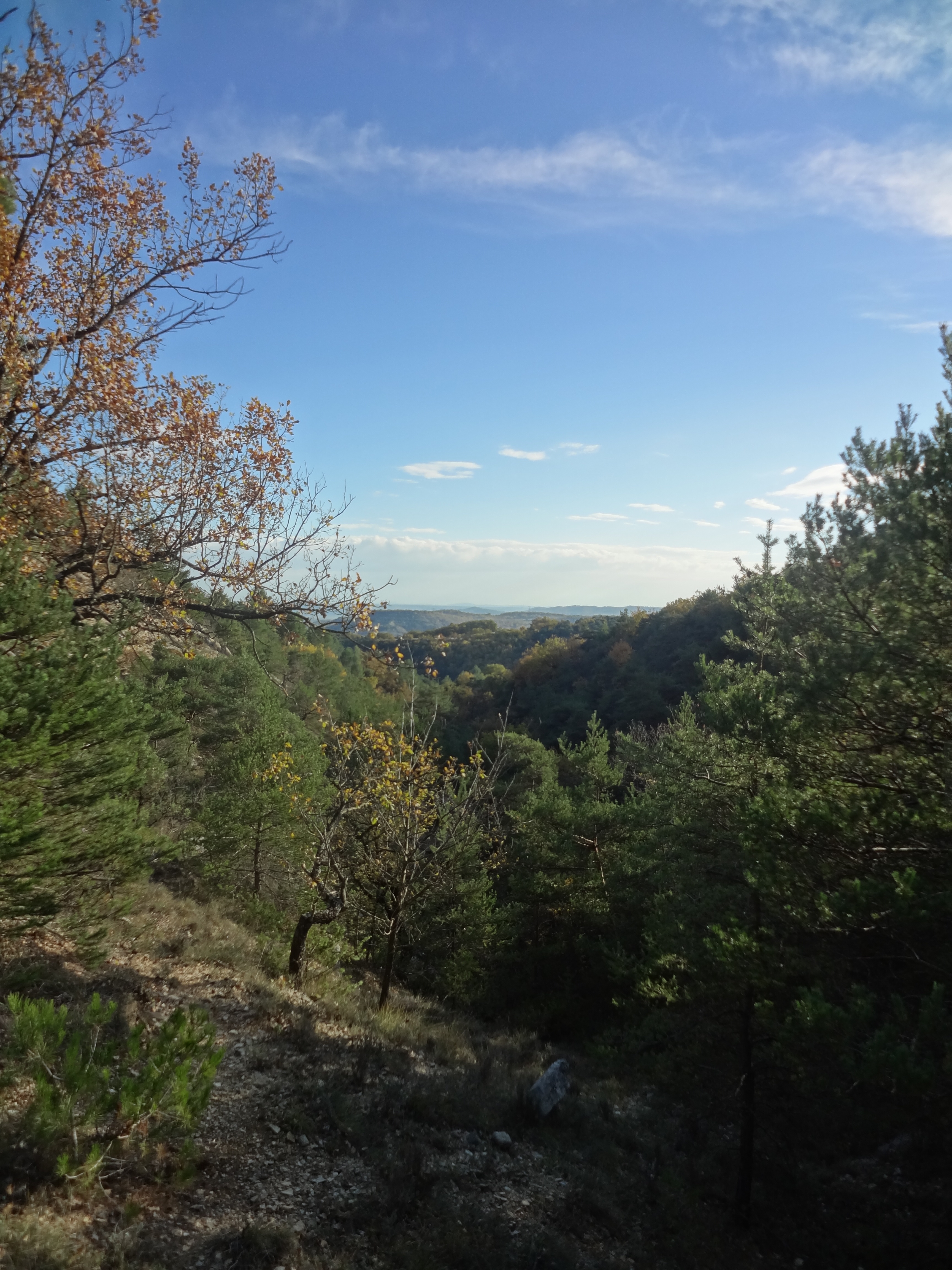 Ravin de Jean-Blanc, environ 780 m d’altitude